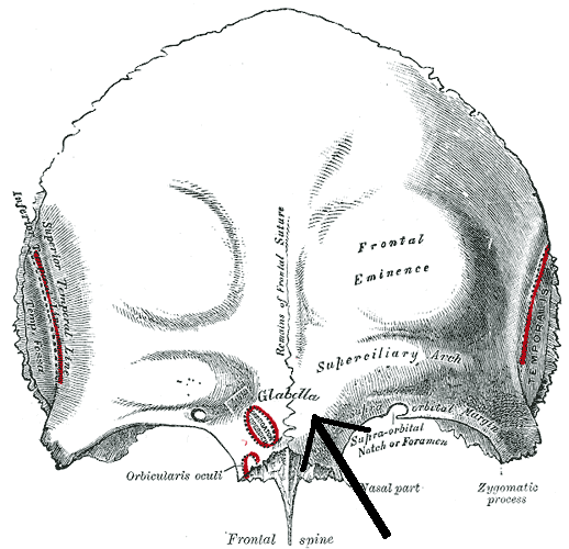 Módosítva